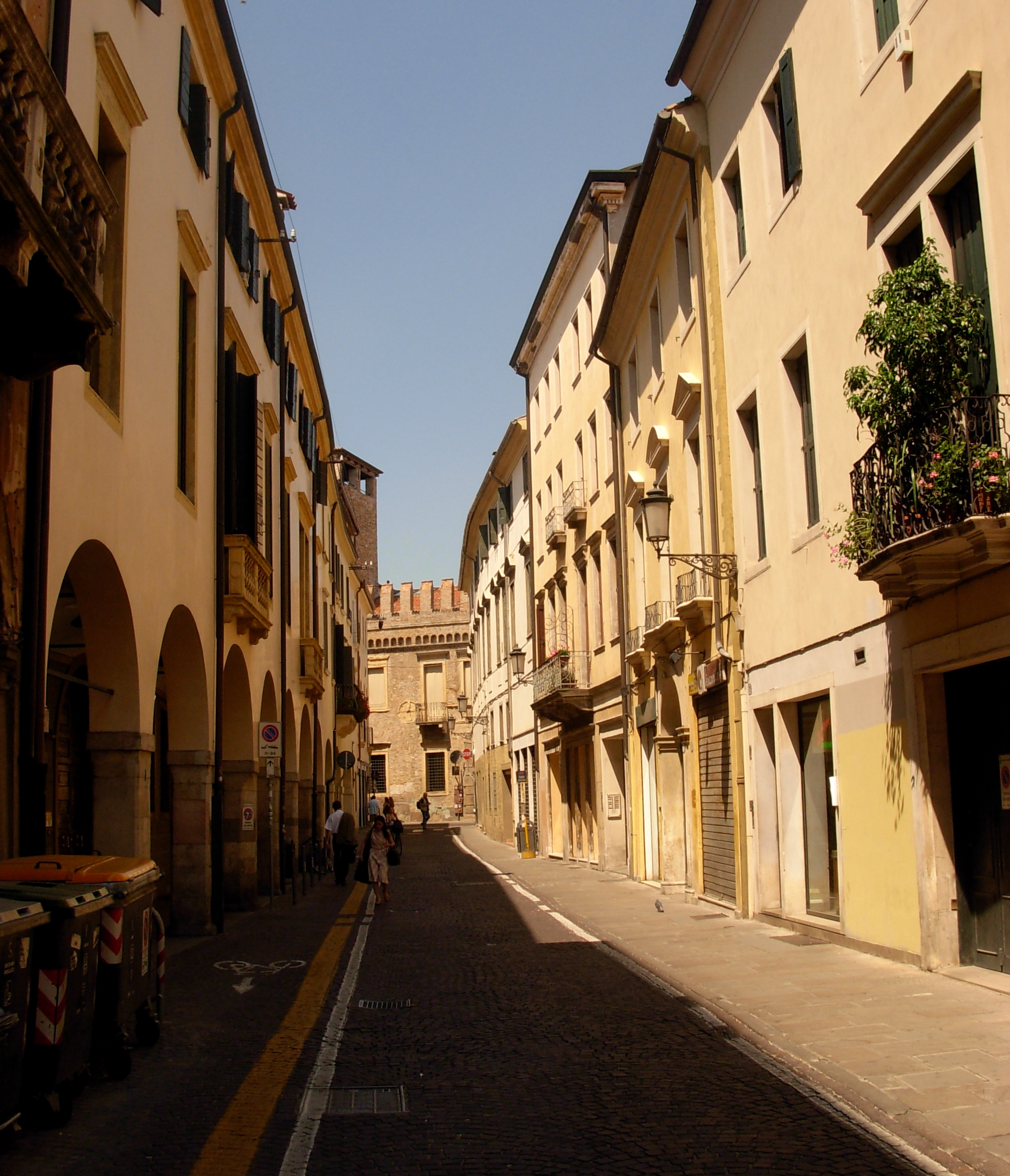 Street in Padova